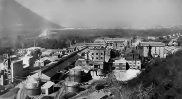 Stabilimento Montecatini presso Sinigo